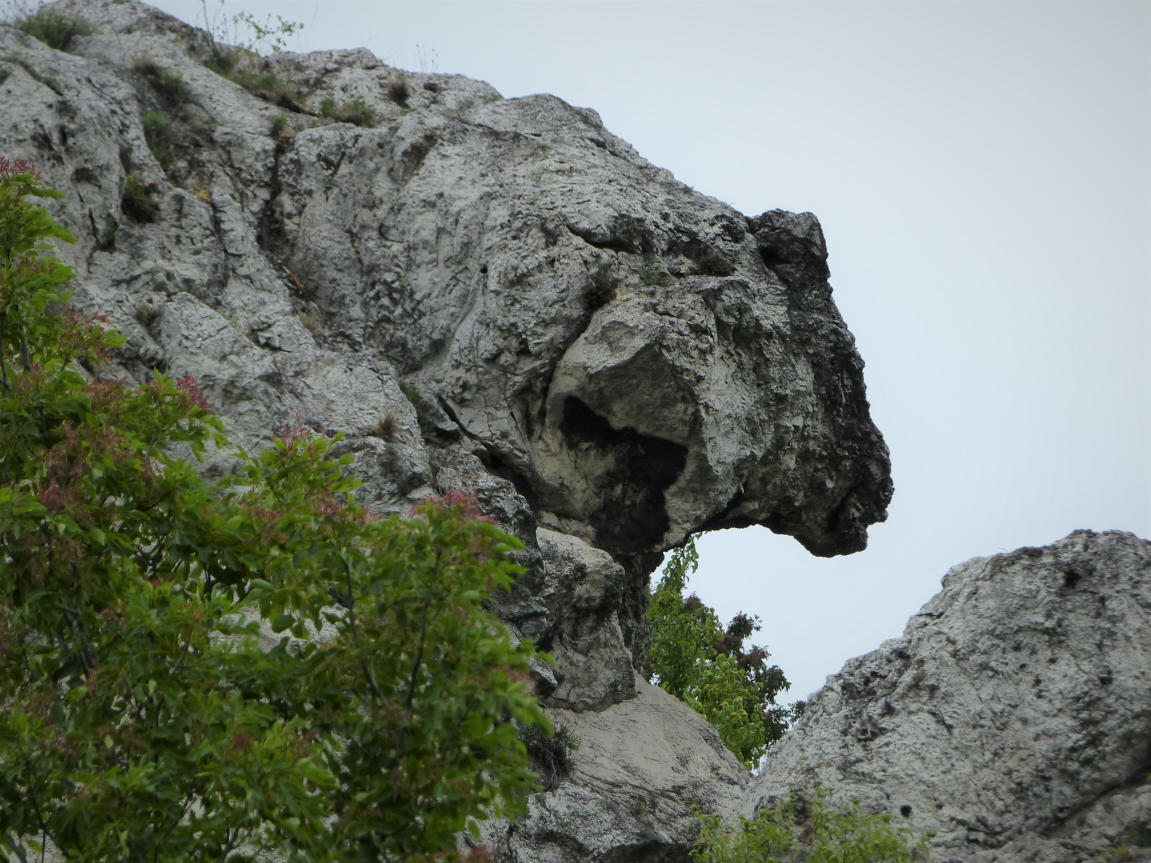 Medve-szikla. Sashegy Természetvédelmi Terület.